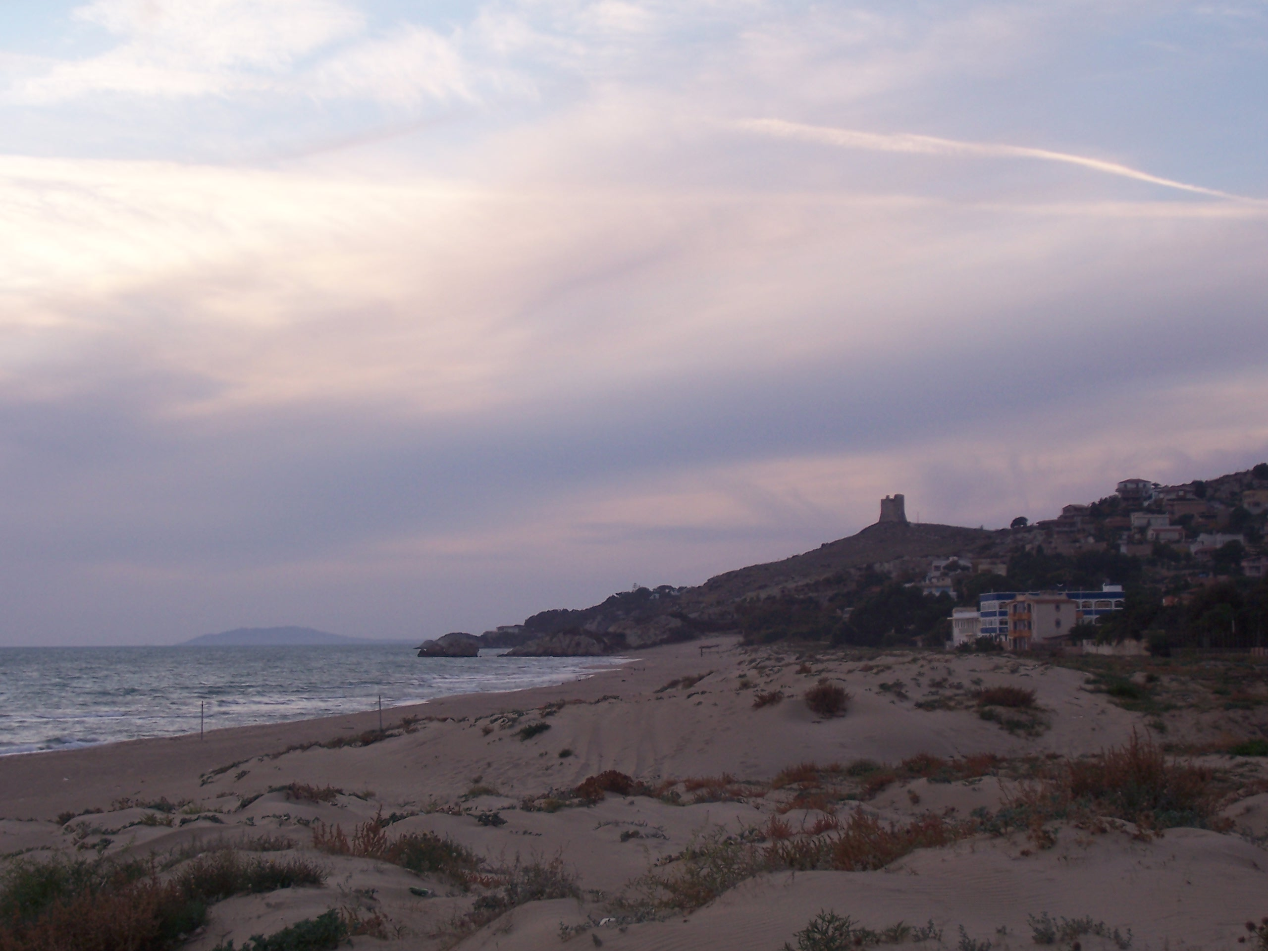 Spiaggia e torre di Manfria (comune di Gela) - Beach and tower of Manfria (municipality of Gela)